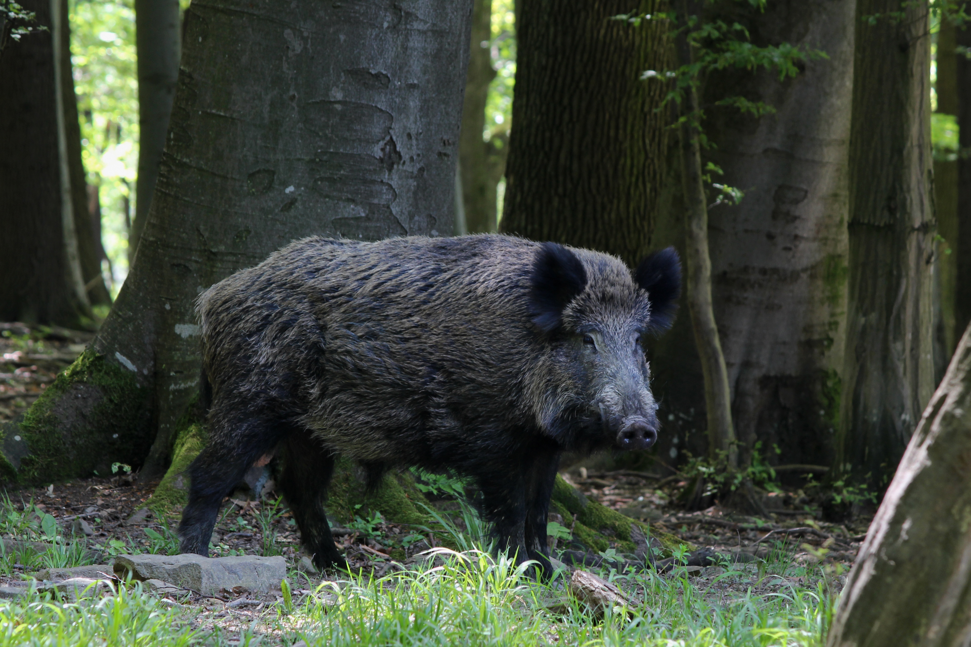 Lainzer Tiergarten This media shows the nature reserve in the Burgenland with the ID 1.